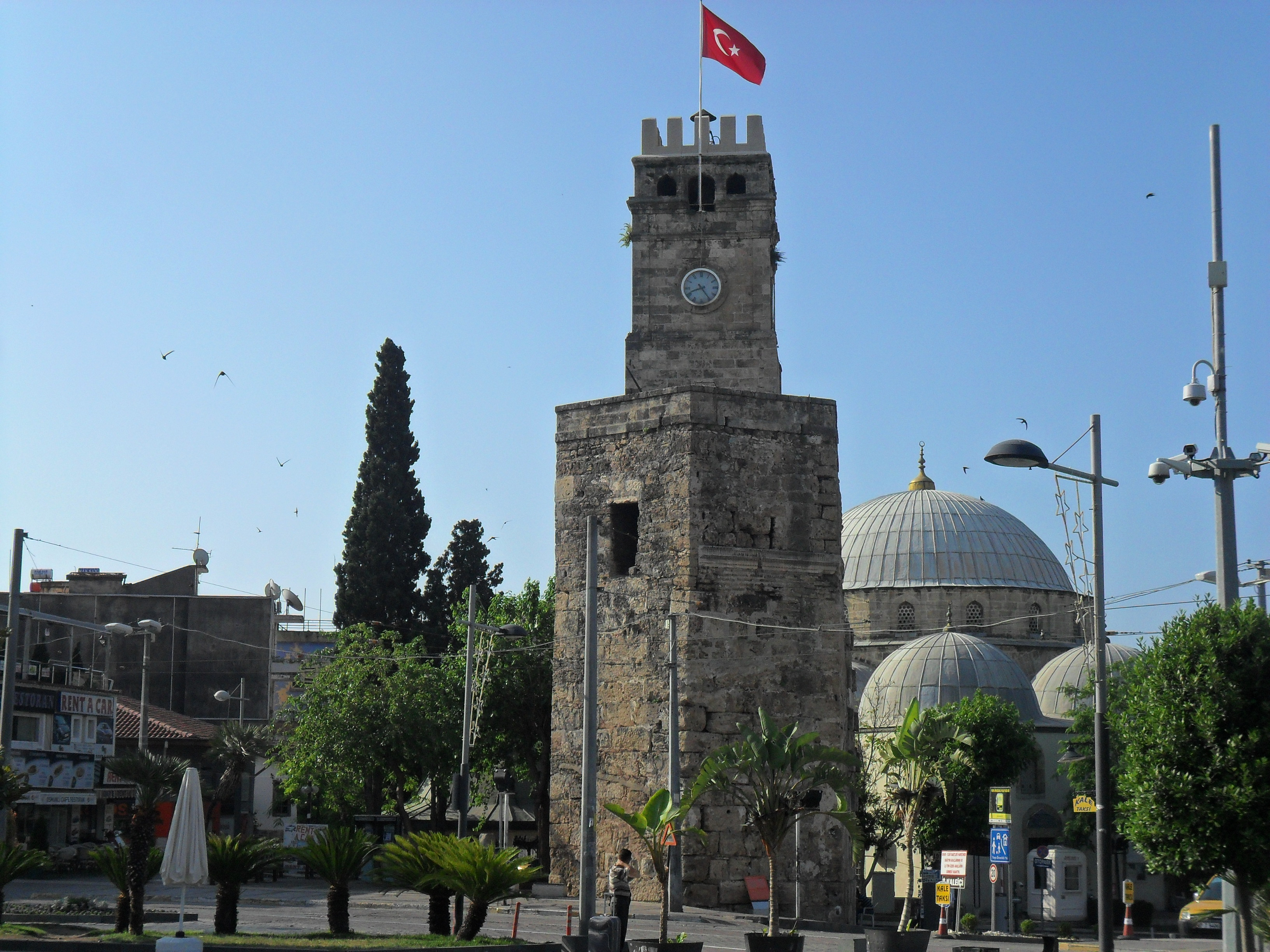 Kale Kapısı mevkiisindeki Antalya Saat Kulesi.